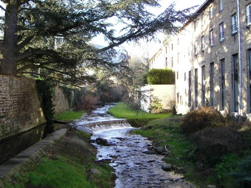 Rivière du ternay à St Julien Molin Molette